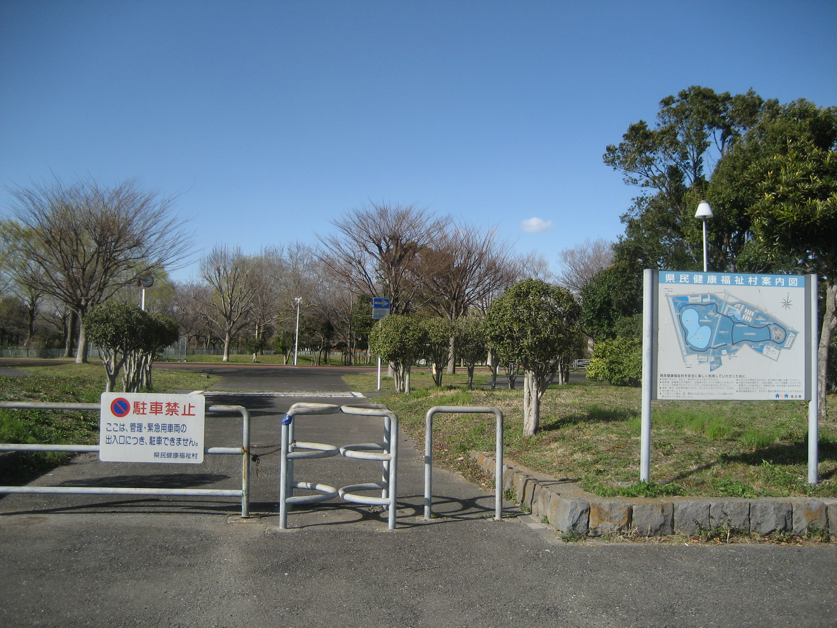 埼玉県越谷市にある県民健康福祉村南側